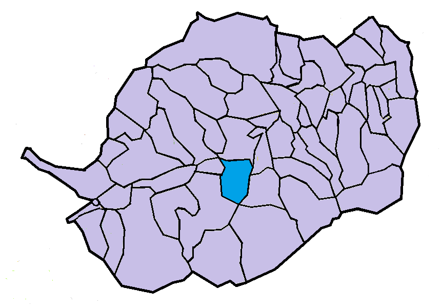 Escaró en el Conflent, a partir del mapa municipal del Conflent de lliure disposició adaptat al Nomenclàtor toponímic aprovat el 2007